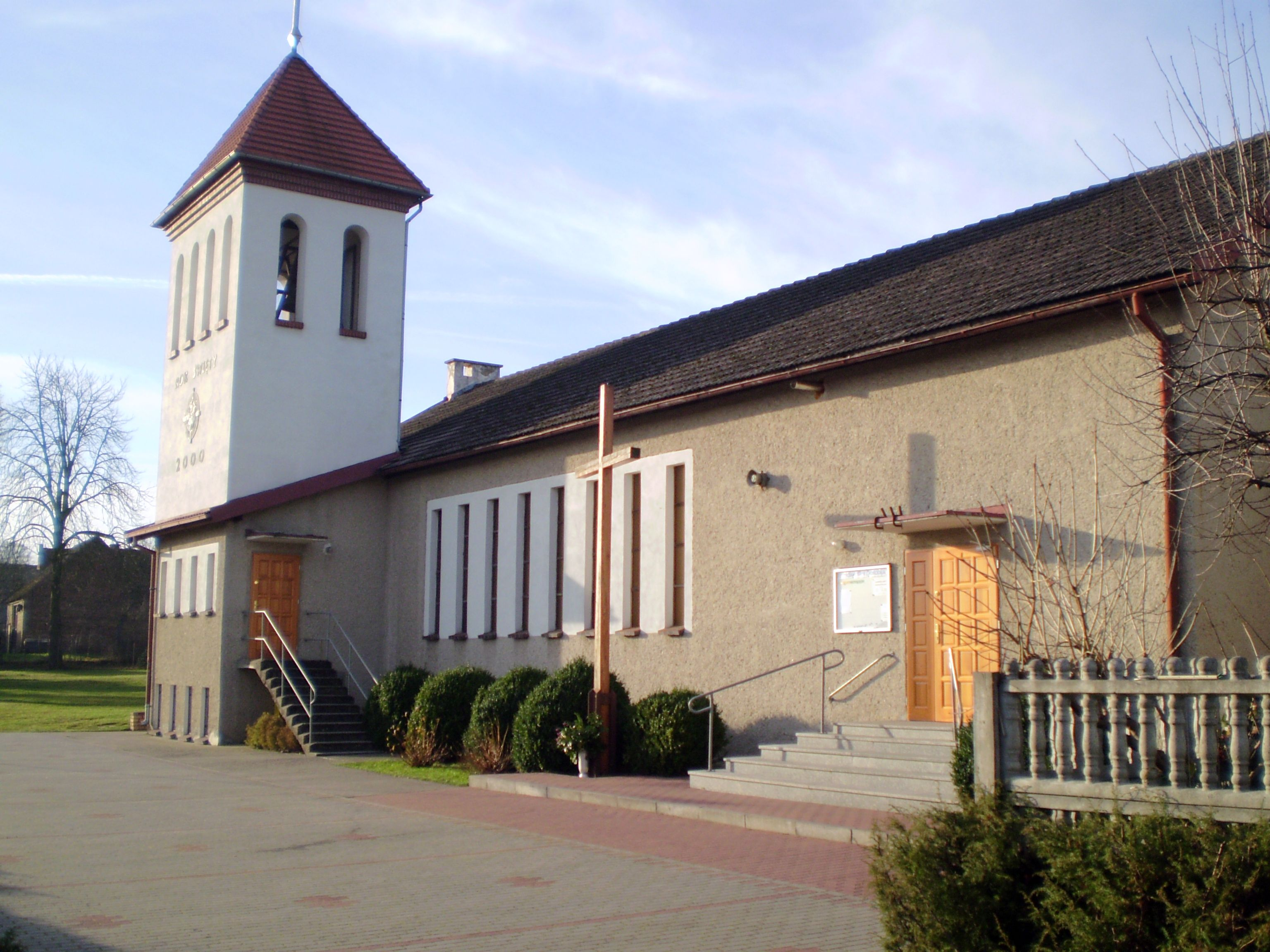 Gubin, ul. Ceglana 2 - rzymskokatolicki kościół parafialny pw. Podwyższenia Krzyża Świętego